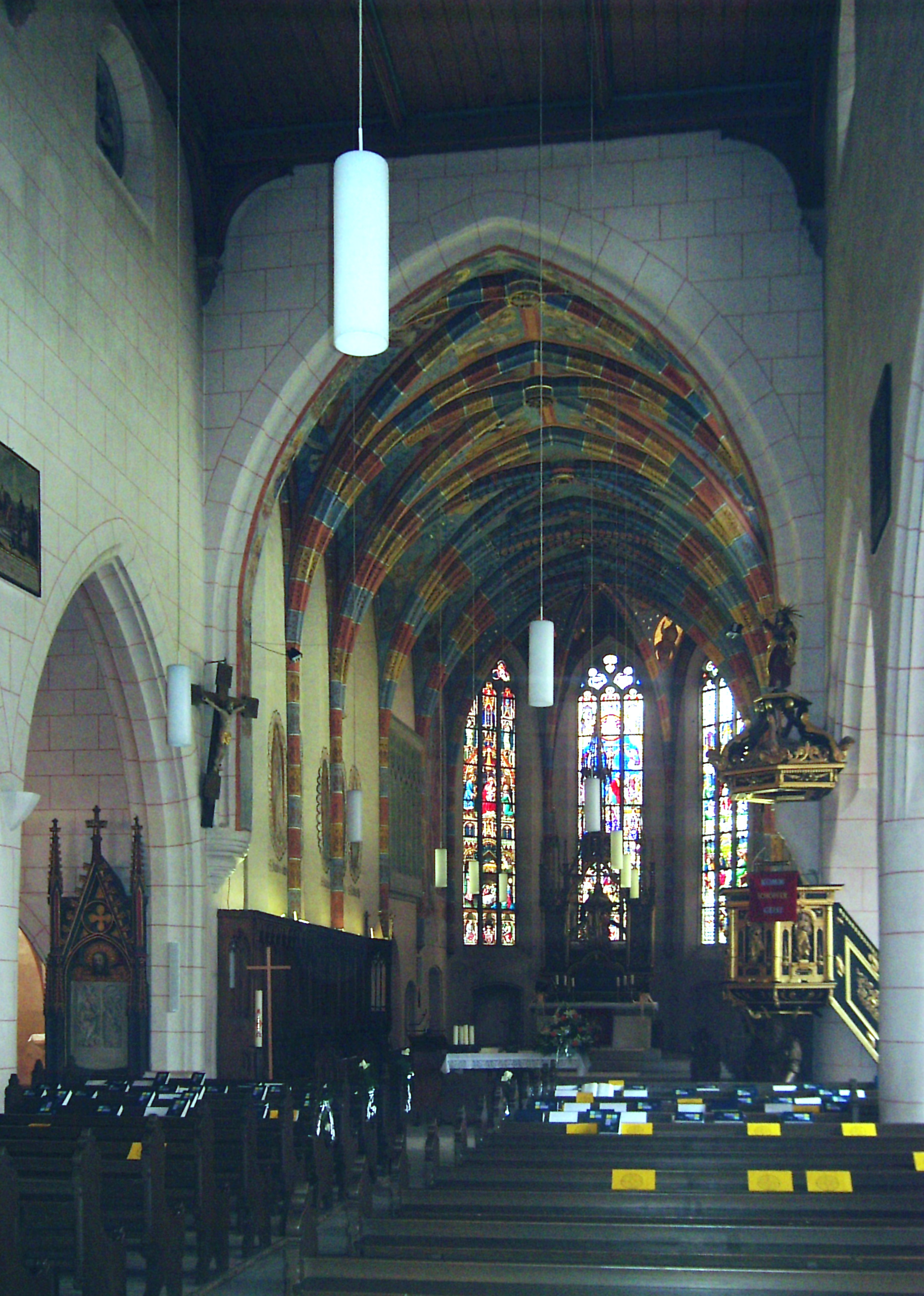 Hauptschiff der evangelischen Stadtkirche Langenzenn